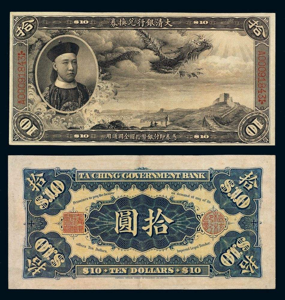 中文（中国大陆）: 大清银行兑换券拾元券